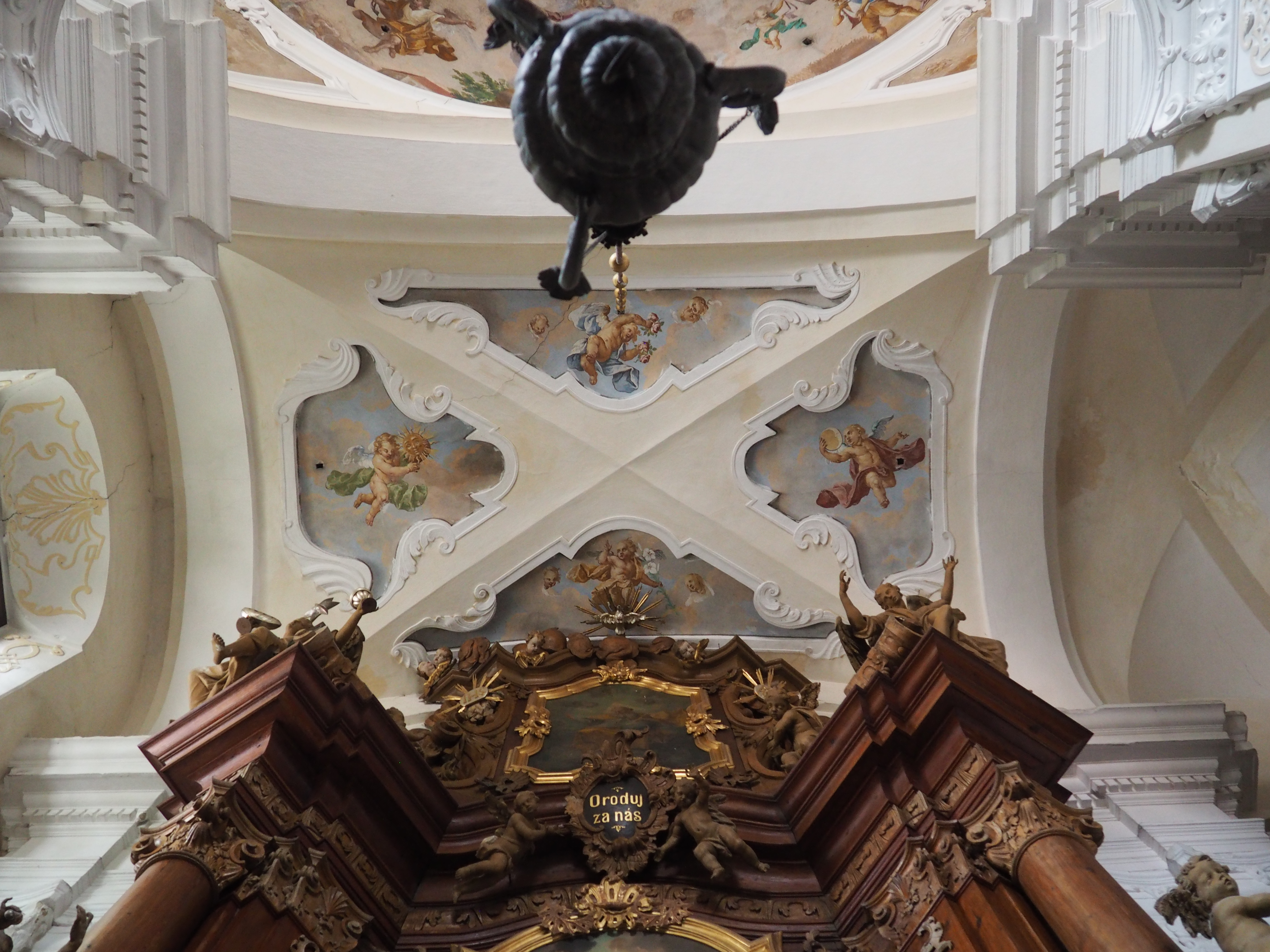 Křížové klenutí s náboženskými freskami.